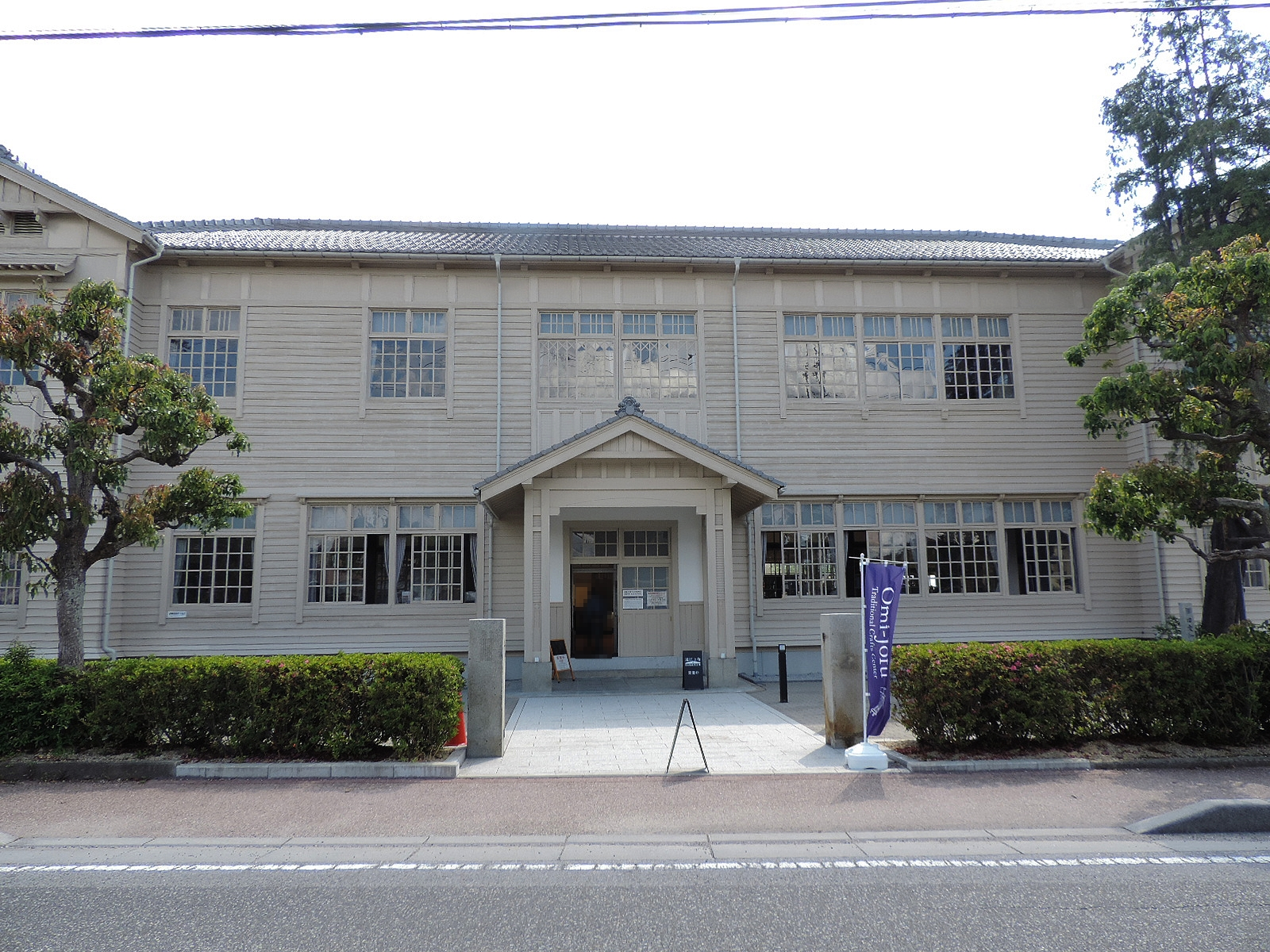 ゆめまちテラスえち（旧愛知郡役所）。2020年5月撮影。